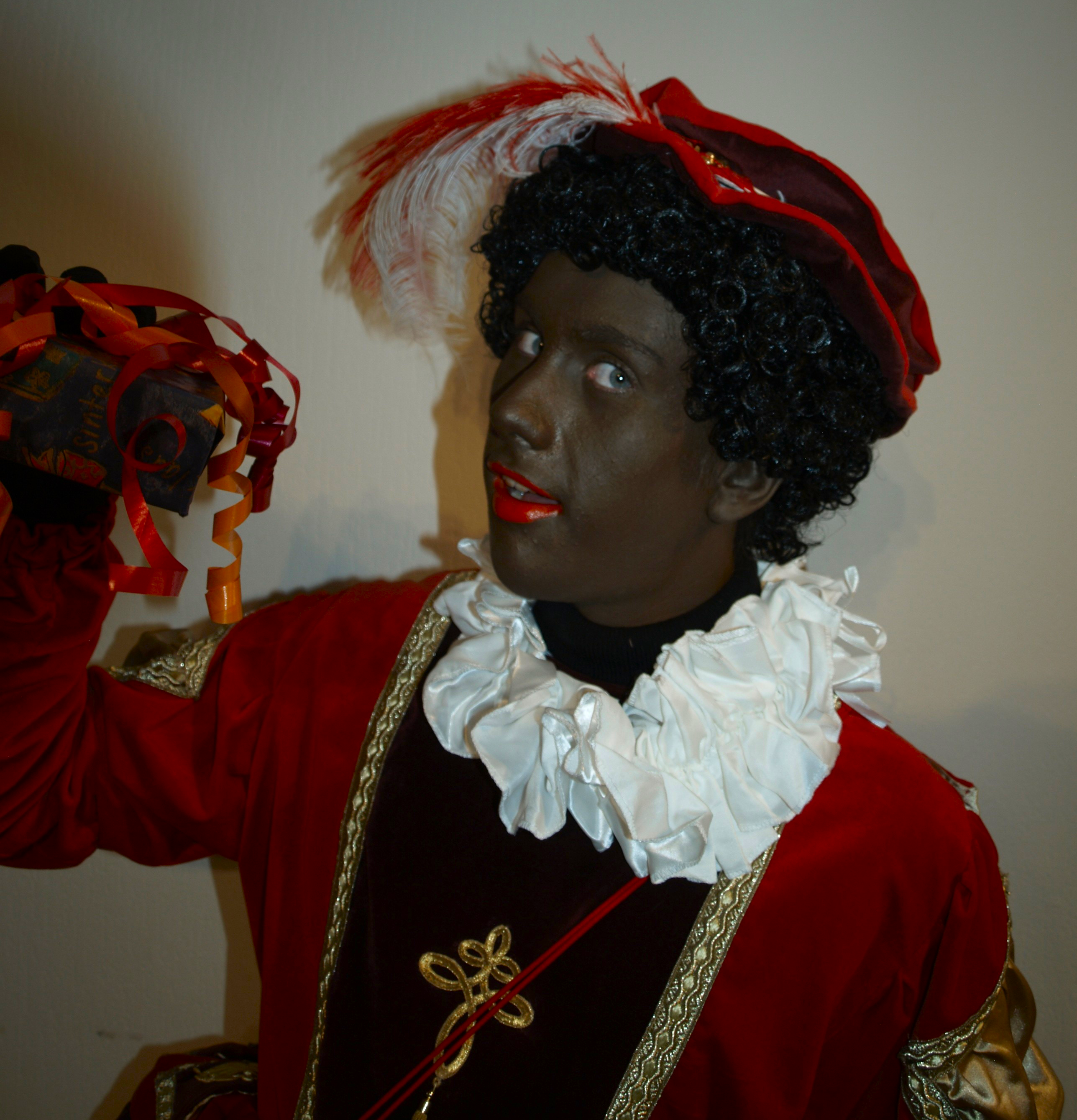 Zwarte Piet